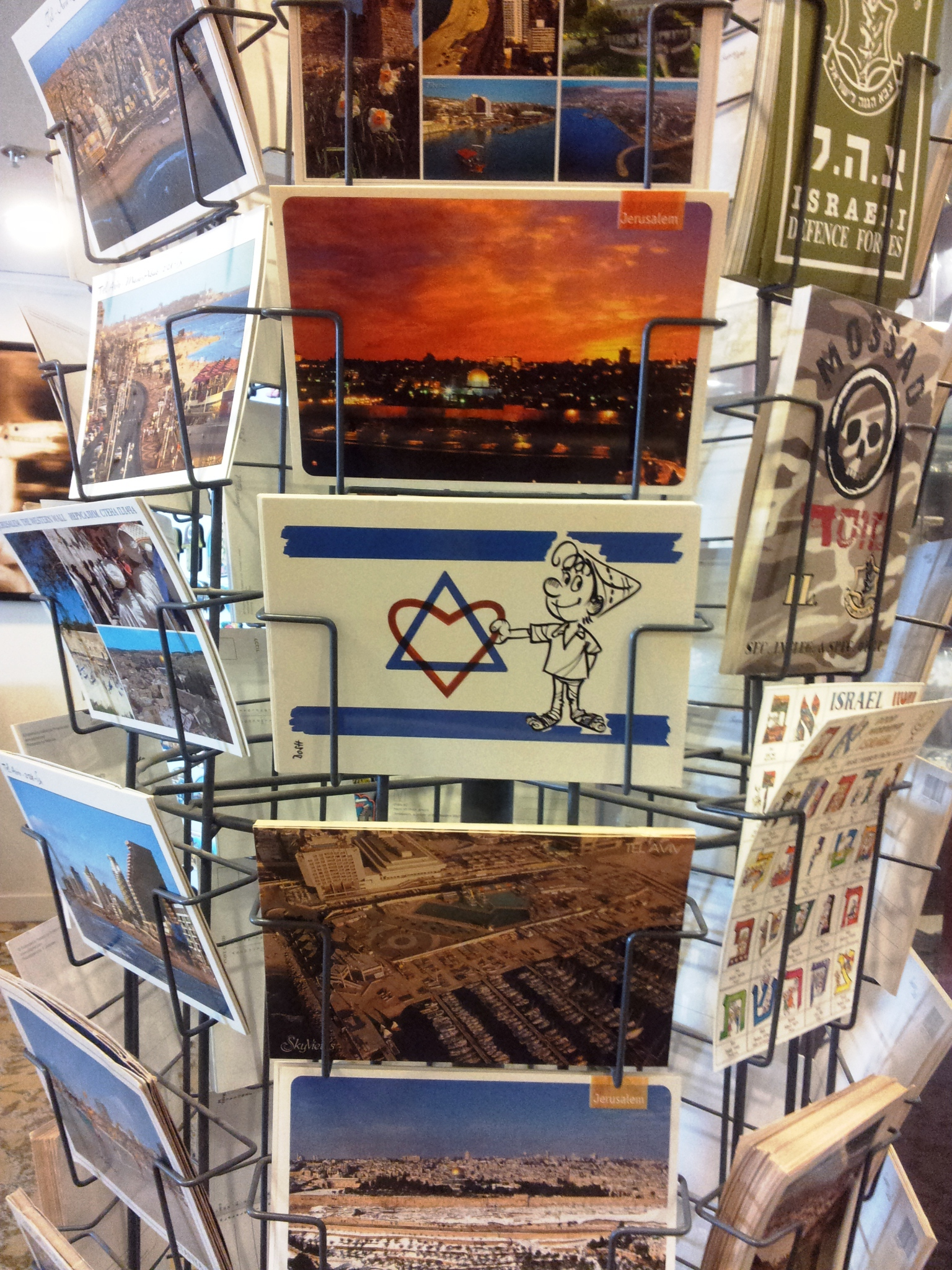 גלויות דואר בישראל